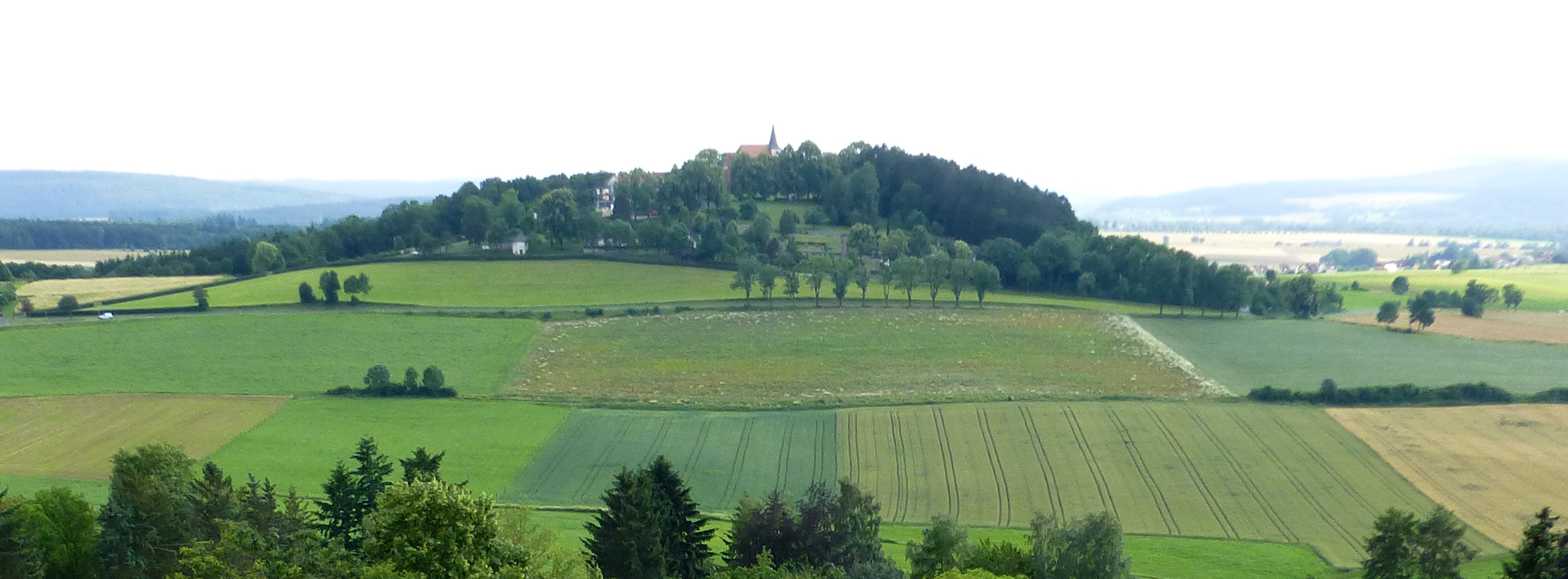 Der Florenberg bei Künzell; Blick vom Dicken Turm in Künzell